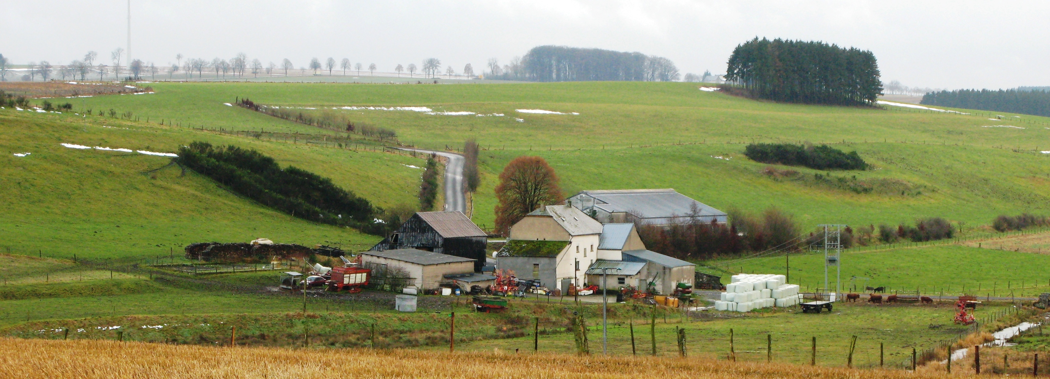 D'Leeresmillen am Dezember 2008. Leeresmillen Leeresmillen